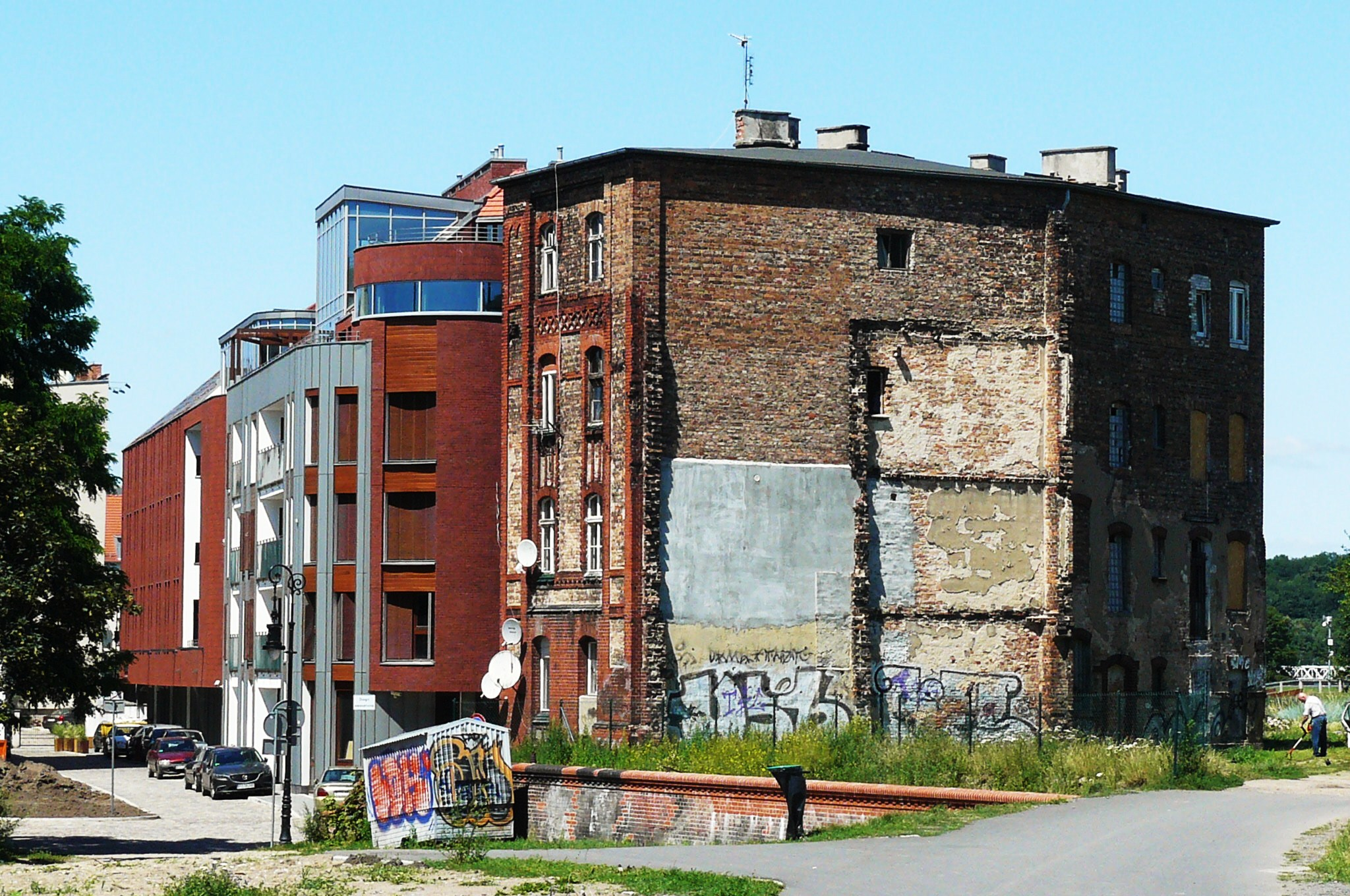 Zmiany urbanistyczna na poznańskim Chwaliszewie w 2015r.